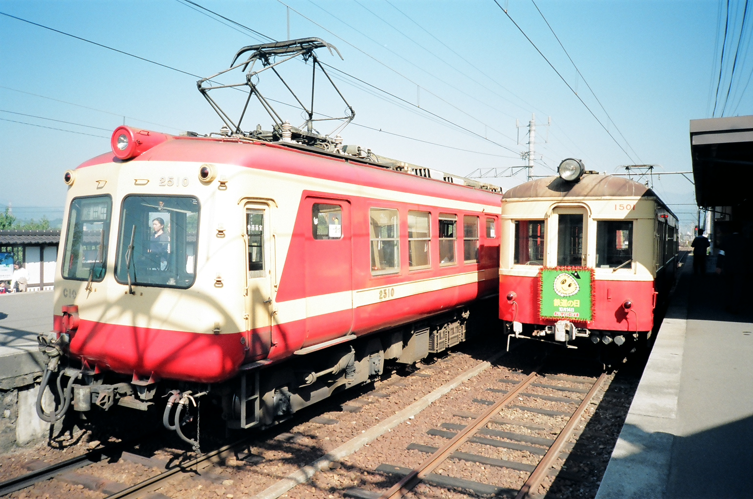 長野電鉄2500系電車